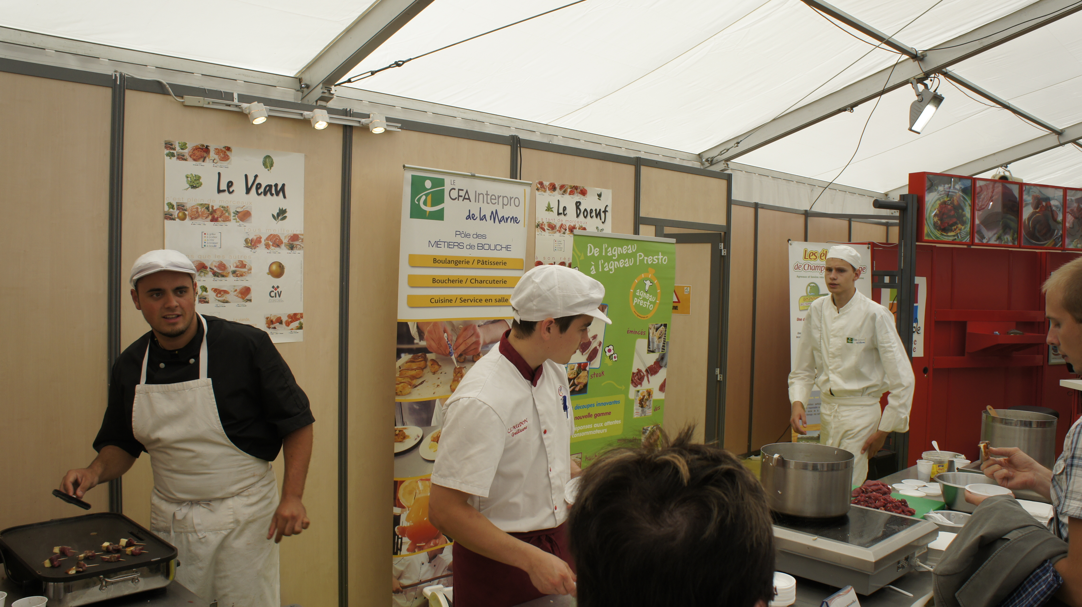 Stand du CFA interpor des métiers de la bouche lors de la Foire de Châlons-en-Champagne de 2012 .